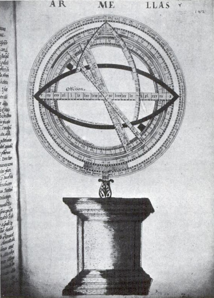 Dice (1936): Ilustración de un tratado de astronomía hecha por J. de Herrera. Según original existente en la biblioteca de El Escorial.